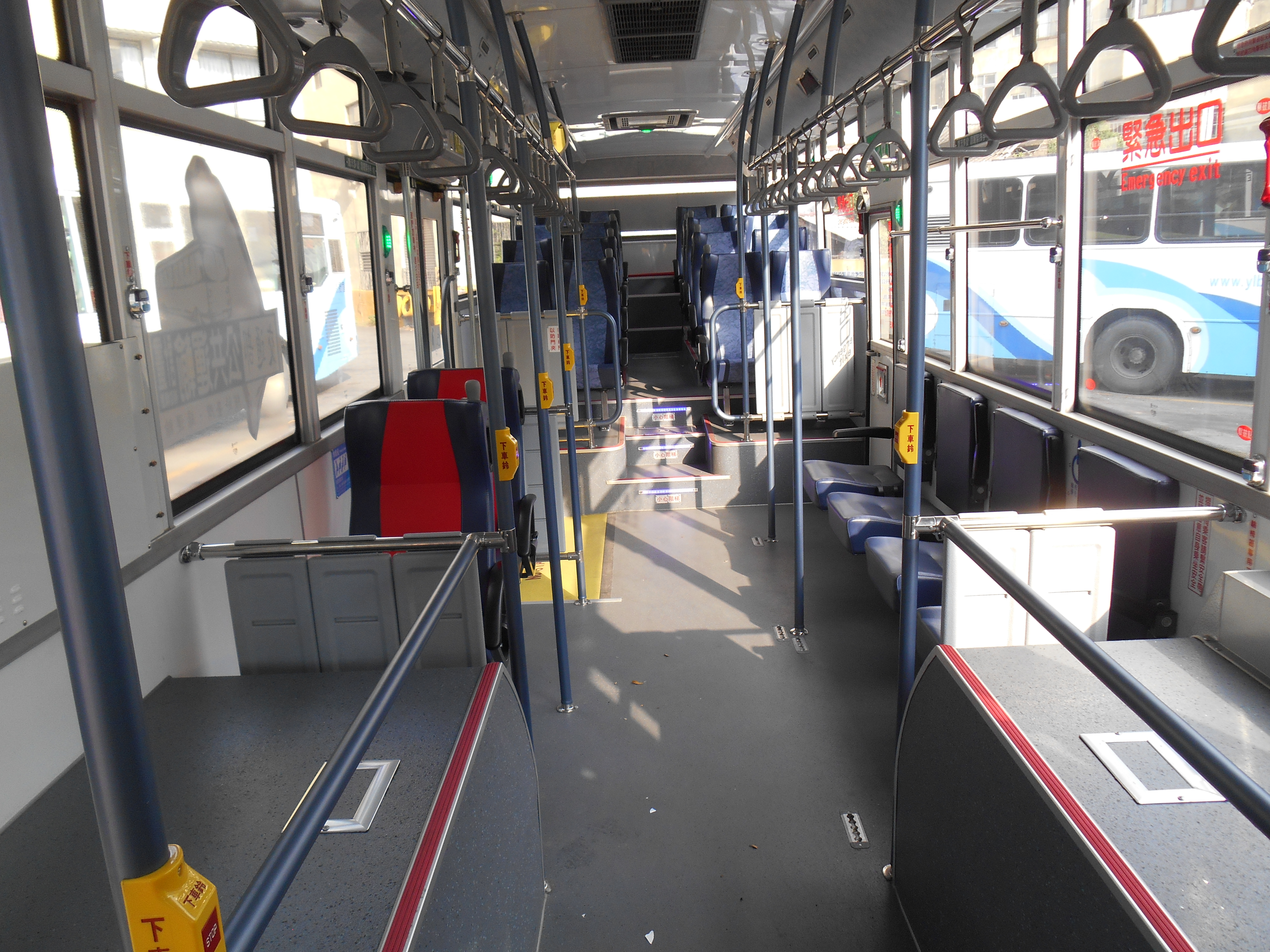 員林客運2014年DAEWOO BS120SN大客車808-FY內裝